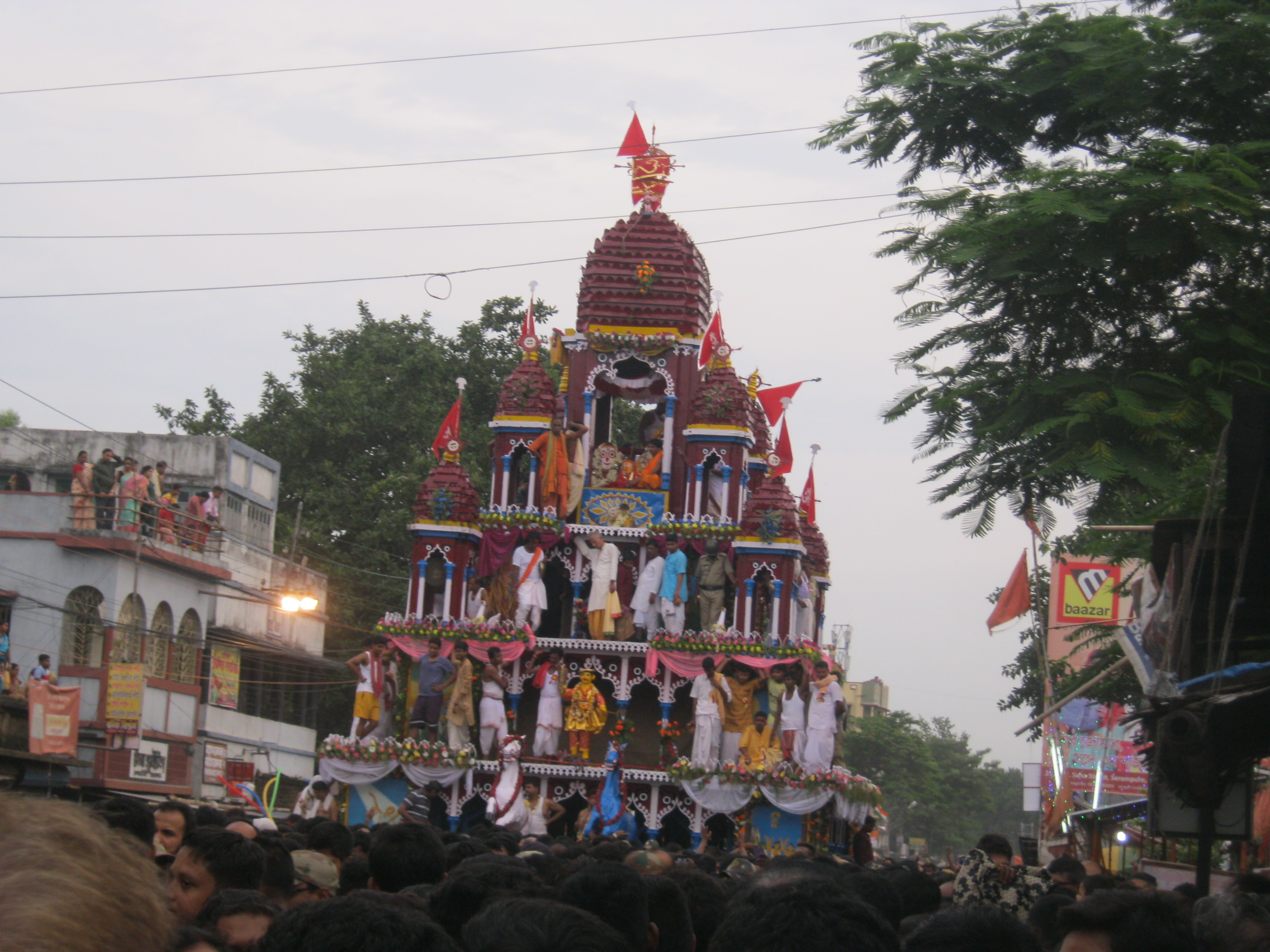 Ratha